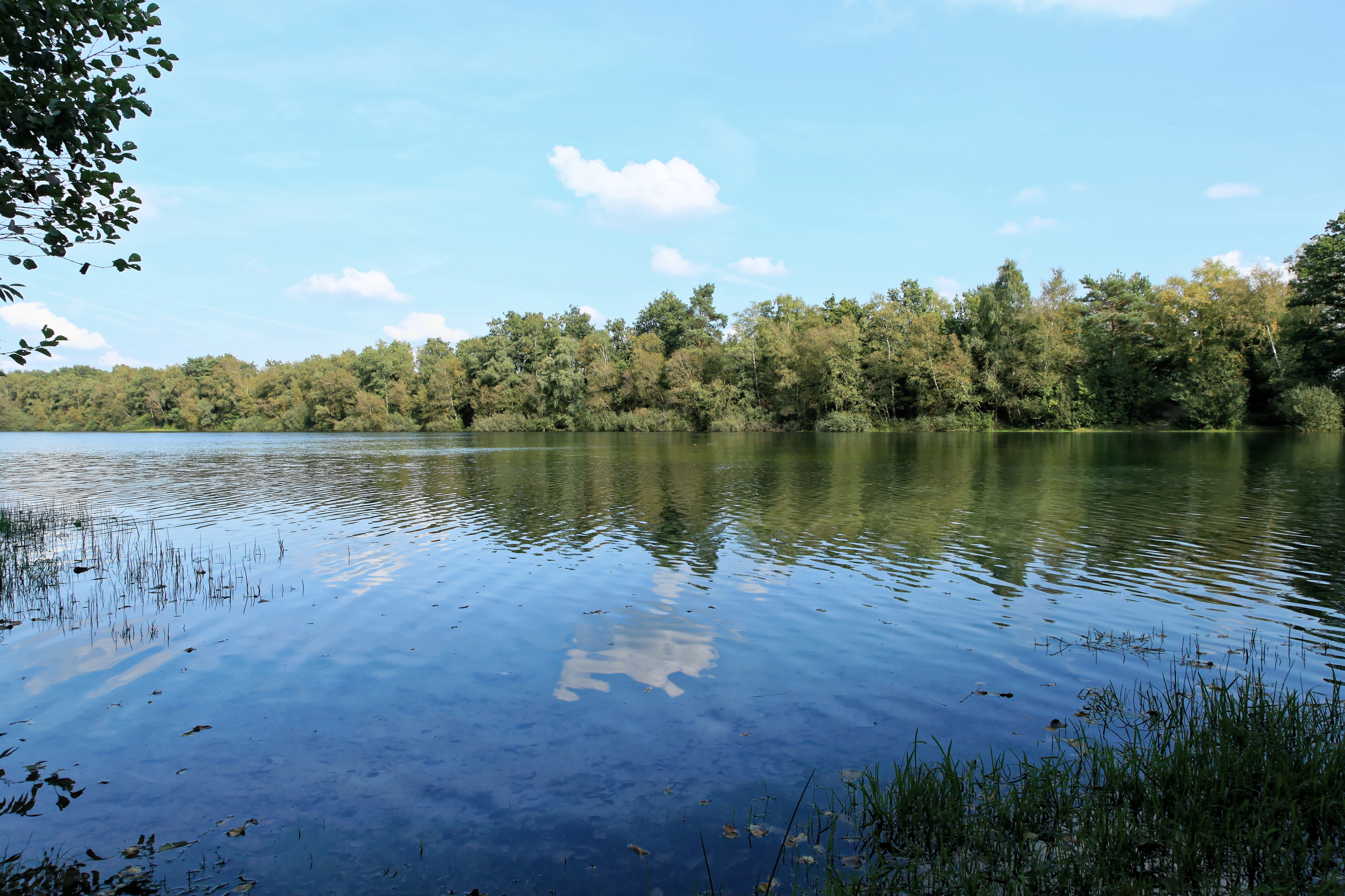 Seitenkanal Gleesen-Papenburg am Ende des Krallmannswegs in Kluse (Emsland)